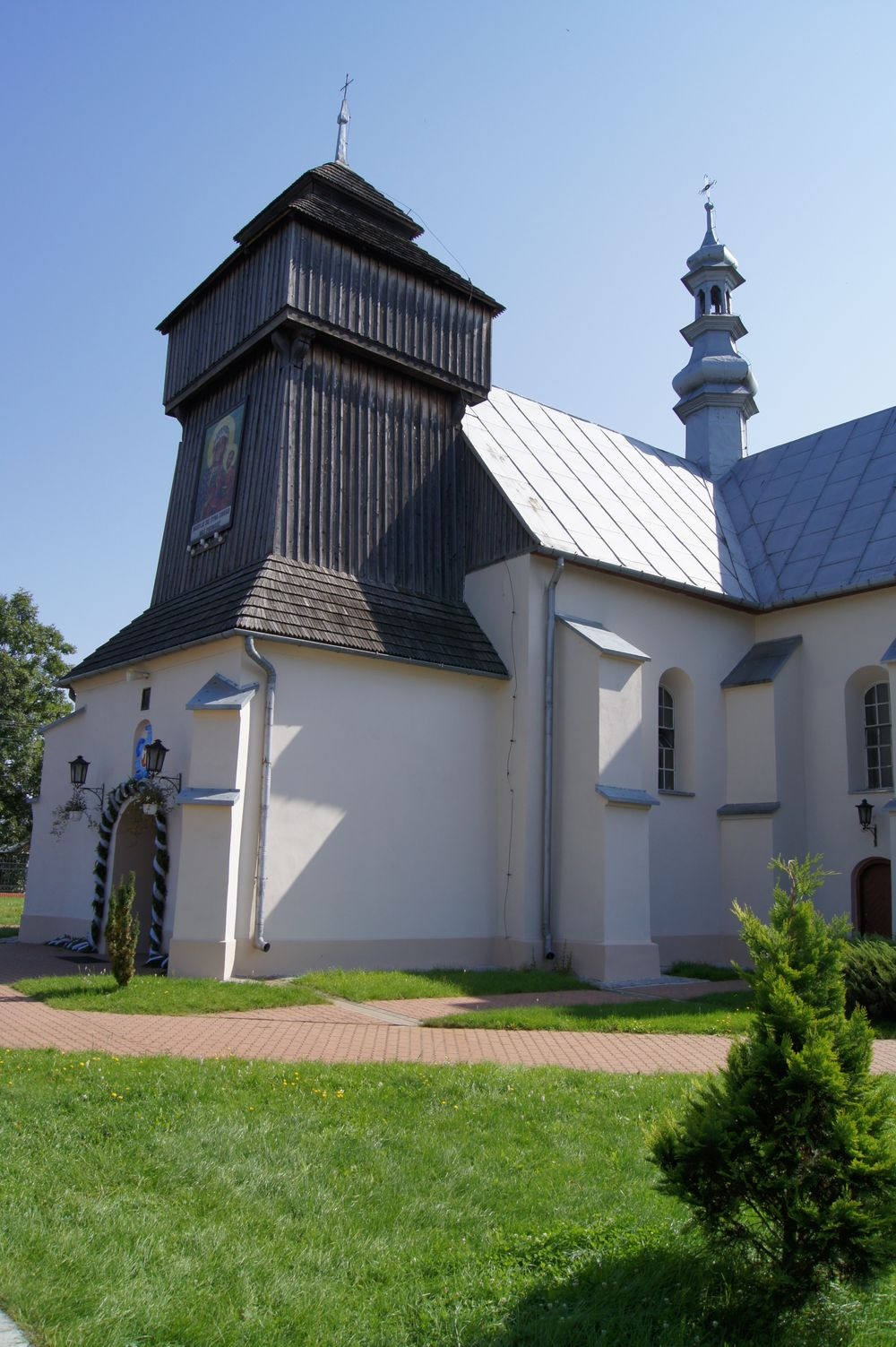 Zbór kalwiński w Oksie